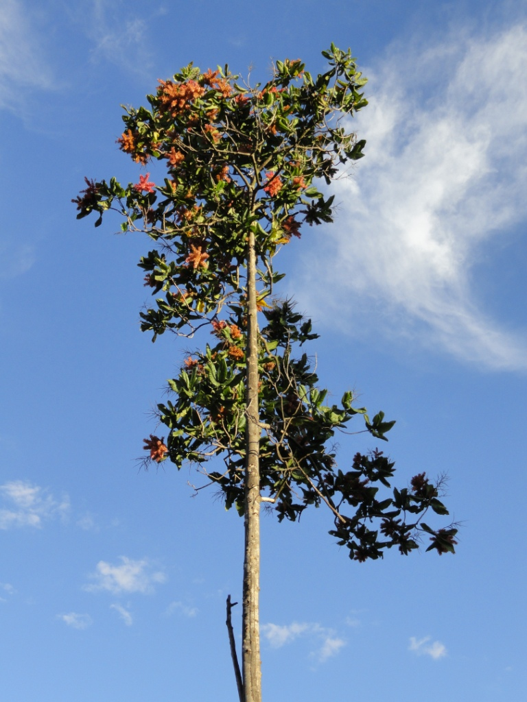 Triplaris americana - POLYGONACEAE Asa Norte - Brasília - Distrito Federal - Brasil.